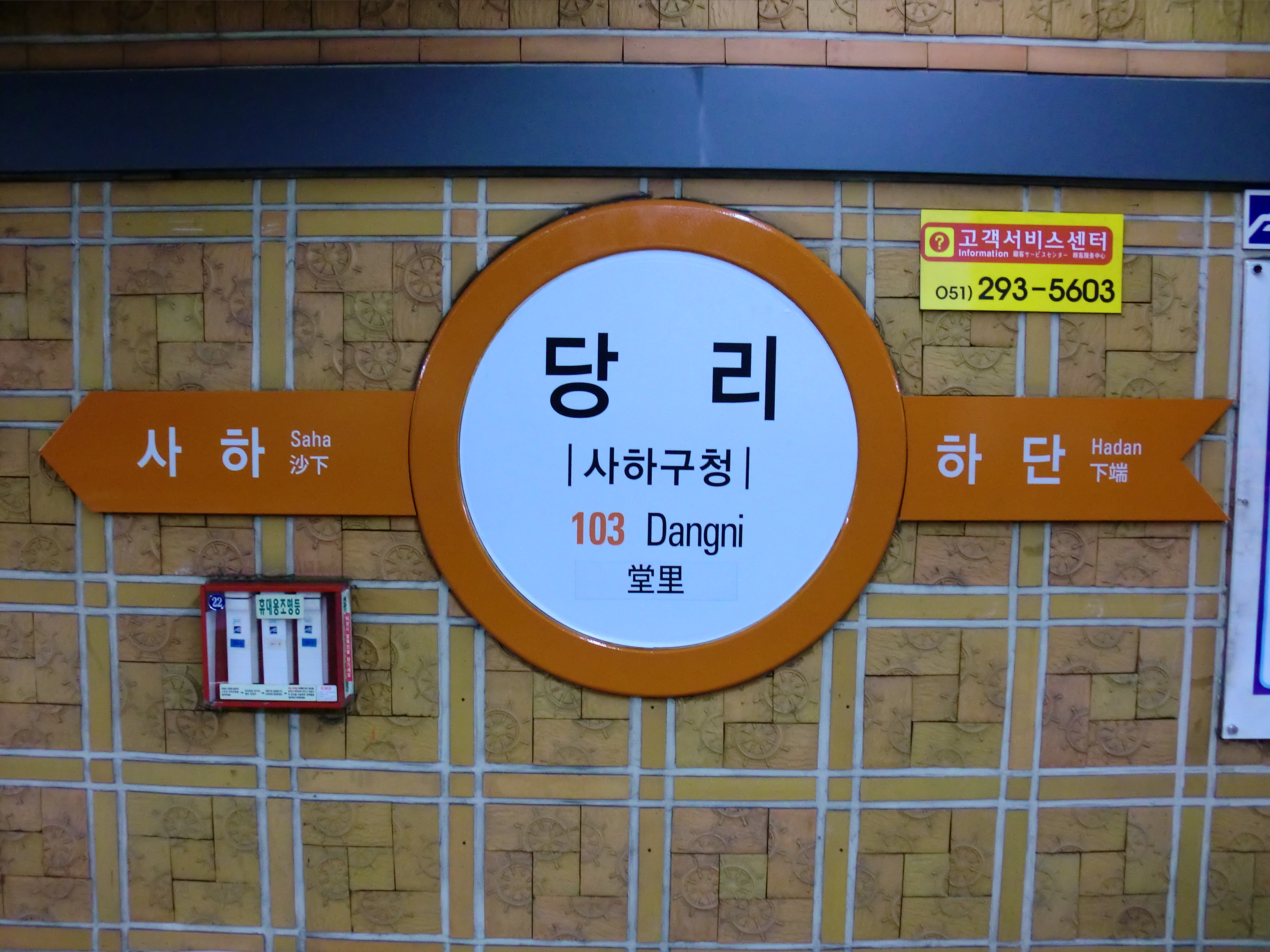 부산도시철도 1호선 당리역의 역명판